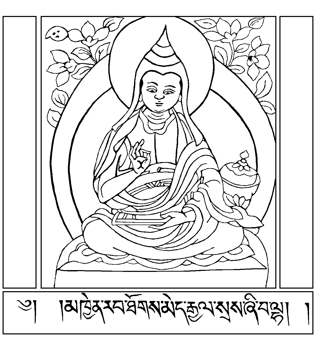 Hình được phép công bố của trang vi: ACIP Thể loại:Đồ tượng Phật giáo